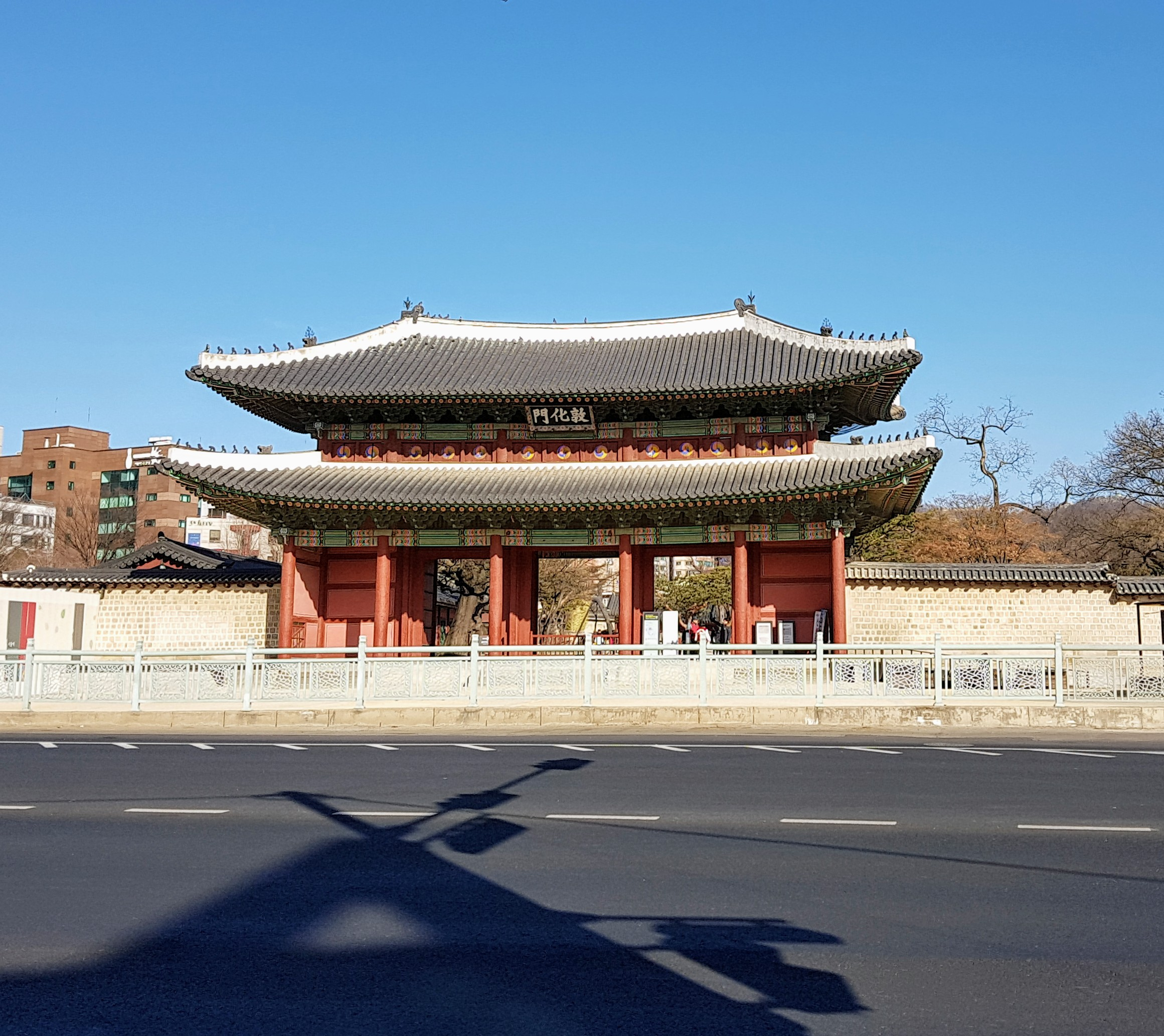 명화문(明化門)은 인경궁의 정문으로 정면 5칸, 측면 2칸에 중층으로 되어있었다. 창덕궁 돈화문과 비슷한 모습이었다.